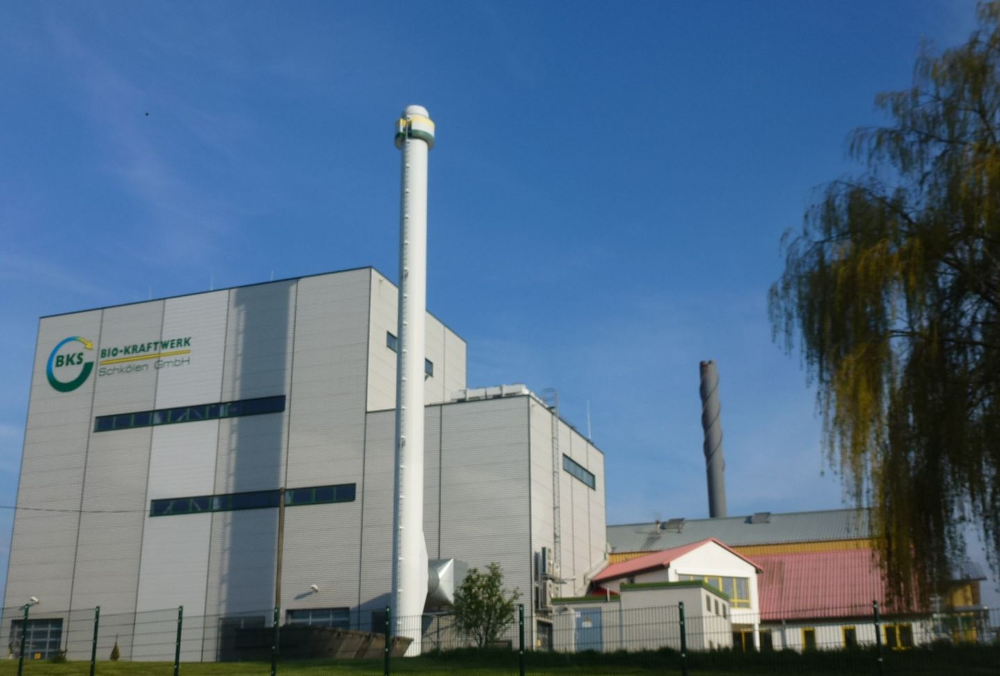 Vorwiegend mit Holz (z.T. mit Heizöl[1]) befeuertes Biomasseheizkraftwerk der Bio-Kraftwerk Schkölen GmbH in Schkölen, Thüringen; ehemals Strohheizwerk